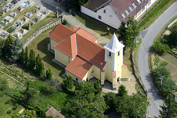 Légi fotó Reziről